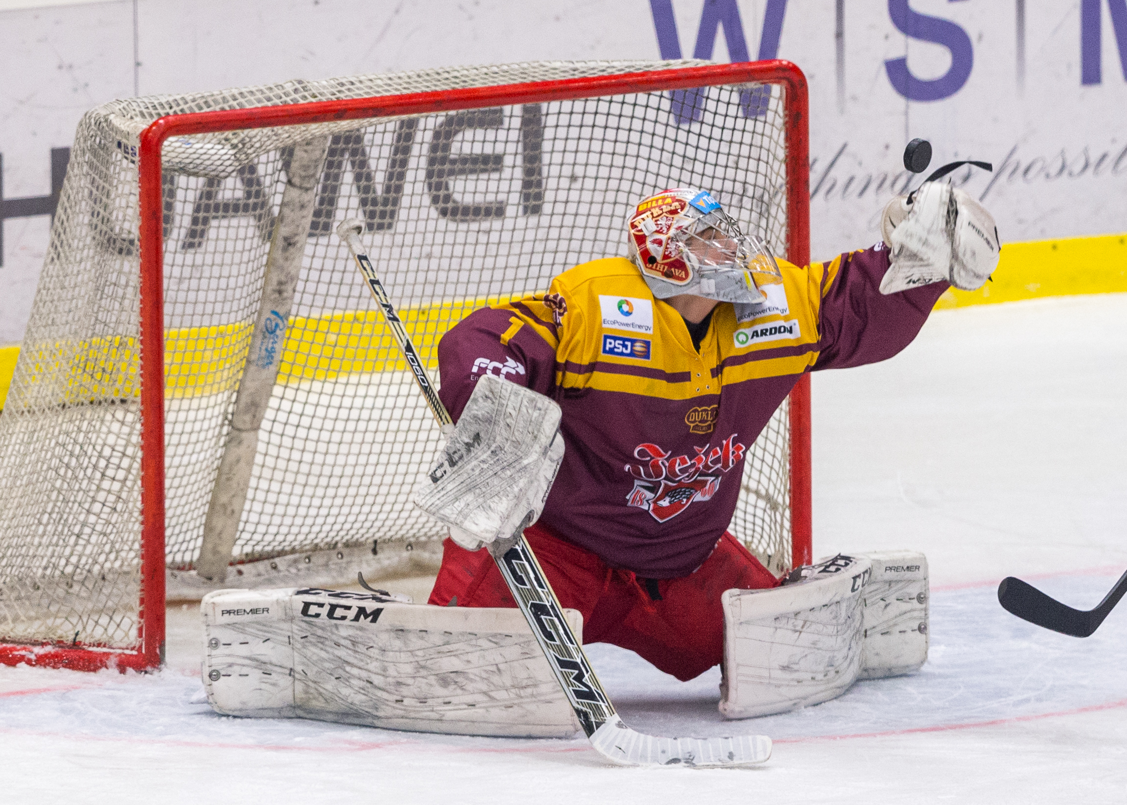 Rytíři Kladno 5:2 Dukla Jihlava